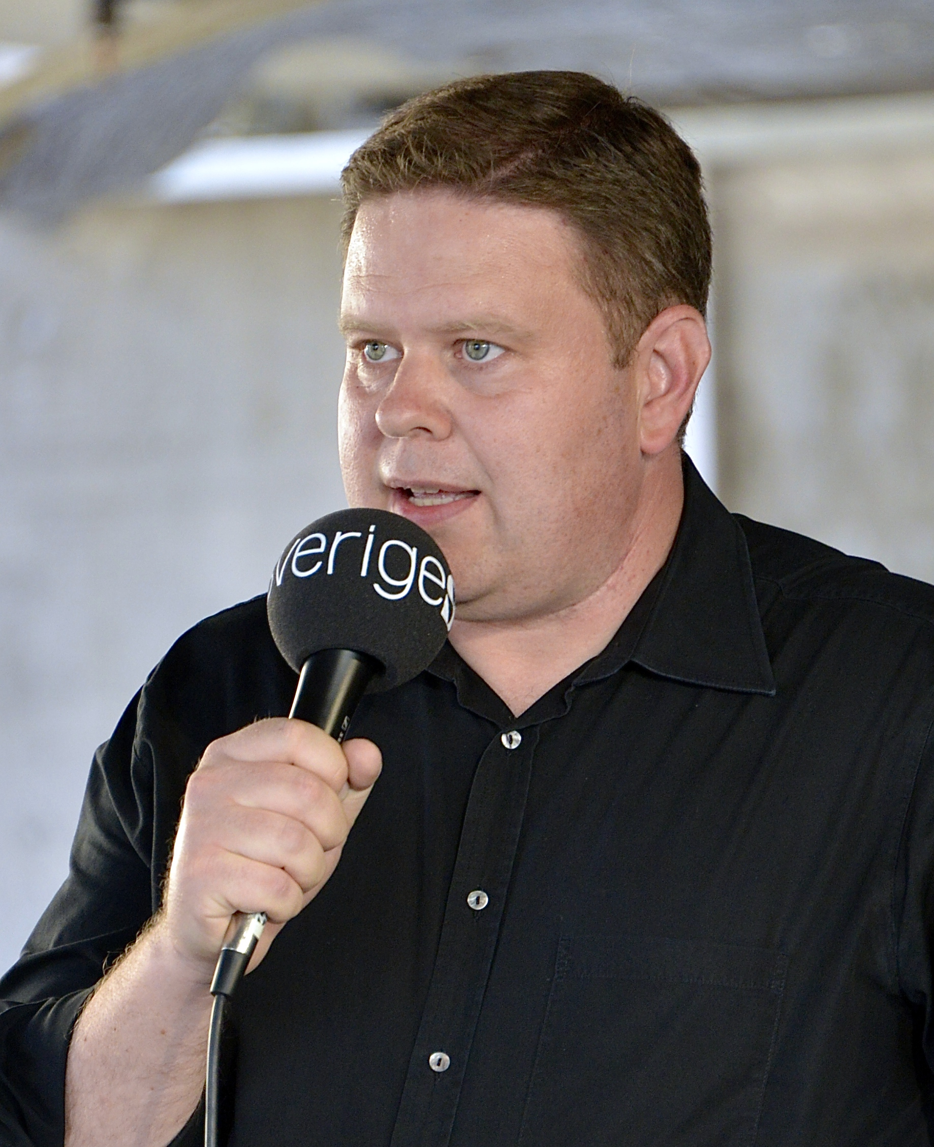 Per Ankersjö i partiledardebatt för stockholmspolitikerna i P4 Stockholm den 11 september 2014.